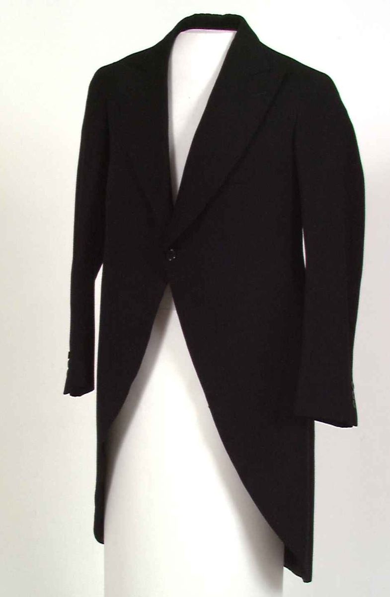 Jakett. Innskrift: K. Grude A/S Stavanger, Herr E. Brikelund 25/6-35 30590 M. Gave 1969. Produsert 1935, K. Grude A/S herrekonfeksjonsfabrikk, Stavanger, Rogaland, Norge. NF.1969-0068A